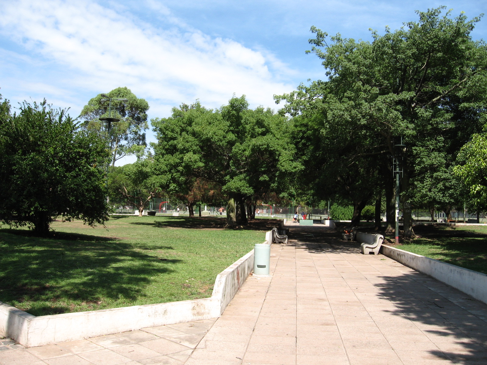 Polideportivo situado en Mosconi y Blanco Encalada, en la ciudad de Buenos Aires. Yo mismo saqué la foto, libero todos los derechos y la pongo en el dominio público.